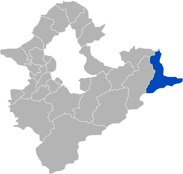 KaurJmeb為編輯中華民國臺灣省臺北縣貢寮鄉，於2004年2月7日所繪